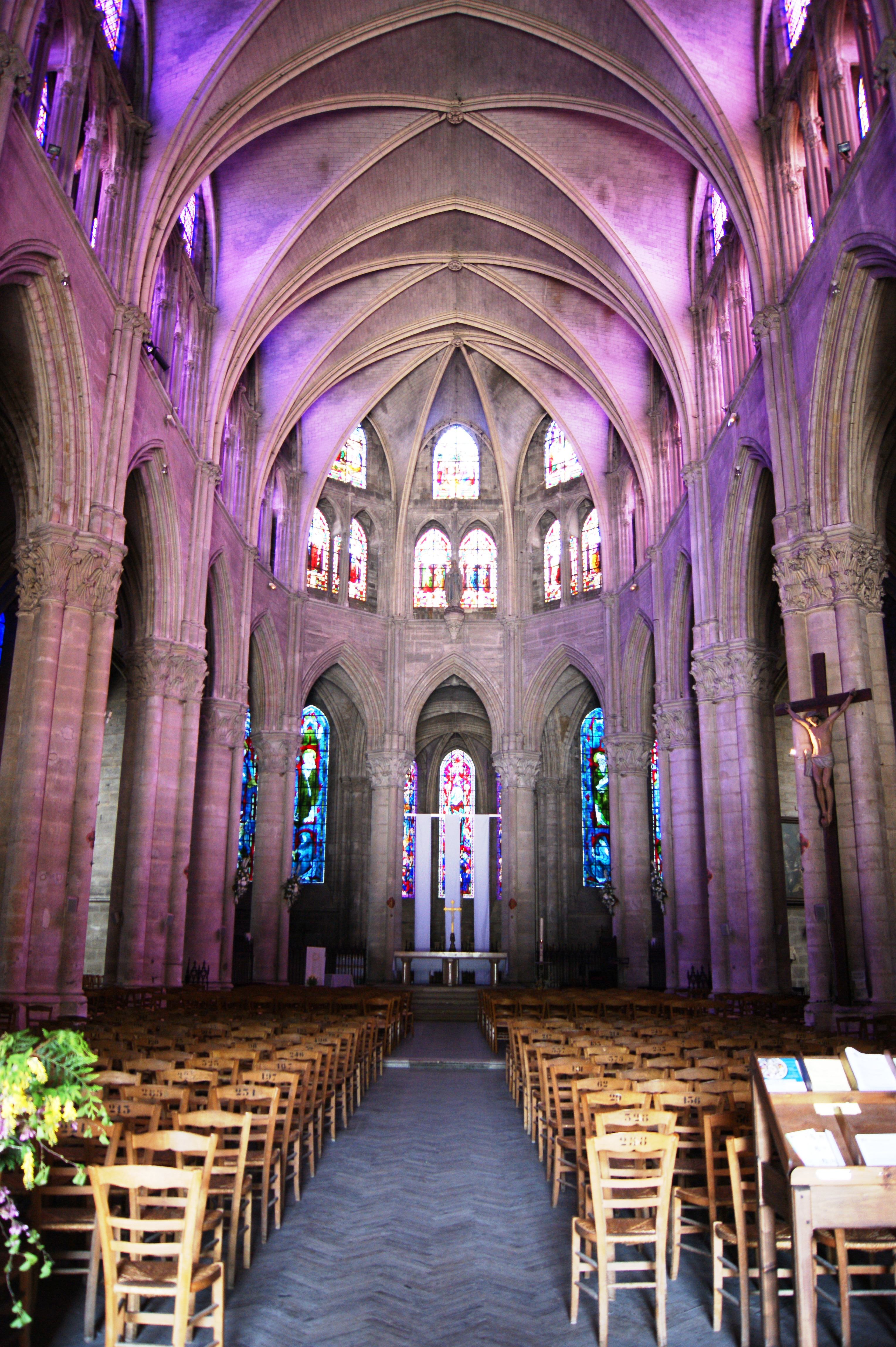 Abbatiale Notre-Dame-des-Ardents et Saint-Pierre - Lagny sur Marne.